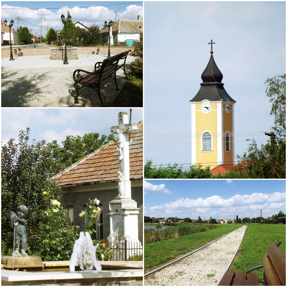 Dör község fotókon: Jobb felső képen a Kisboldogasszony római katolikus templom, alatta a Veremszeri-tó látható. Bal felső képen a Petőfi Sándor utca és Szabadság utca keresztezésénél kialakított tér, alatta pedig a téren található szökőkút és a háttérben egy kőkereszt látható.